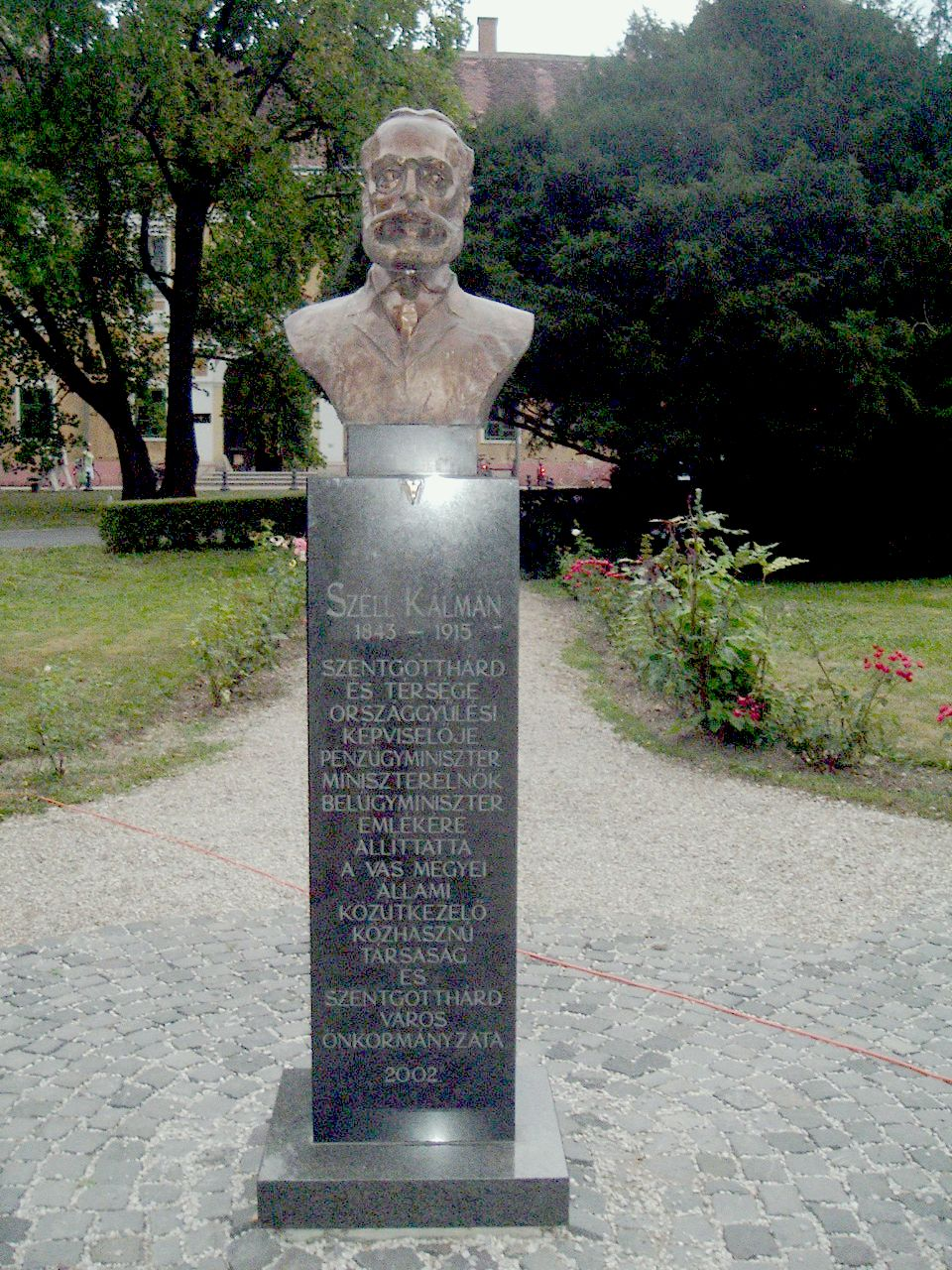 Former prime minister Széll Kálmán's statue in Szentgotthárd